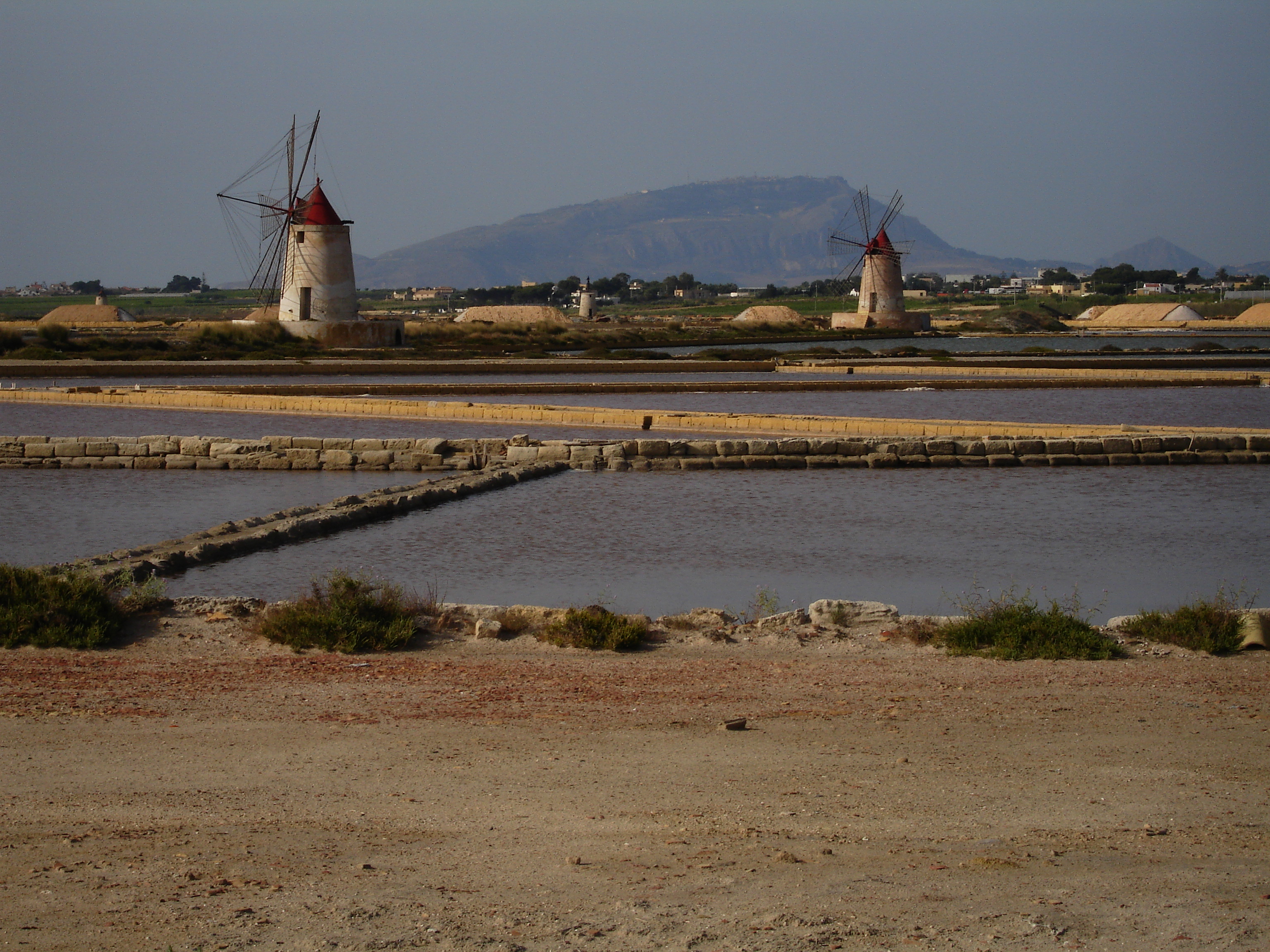 Saline di Trapani e Paceco - Riserva Naturale Regionale This is a photo of a monument which is part of cultural heritage of Italy. The authorisation for taking photos of this object was provided by the World Wide Fund for Nature Italy.